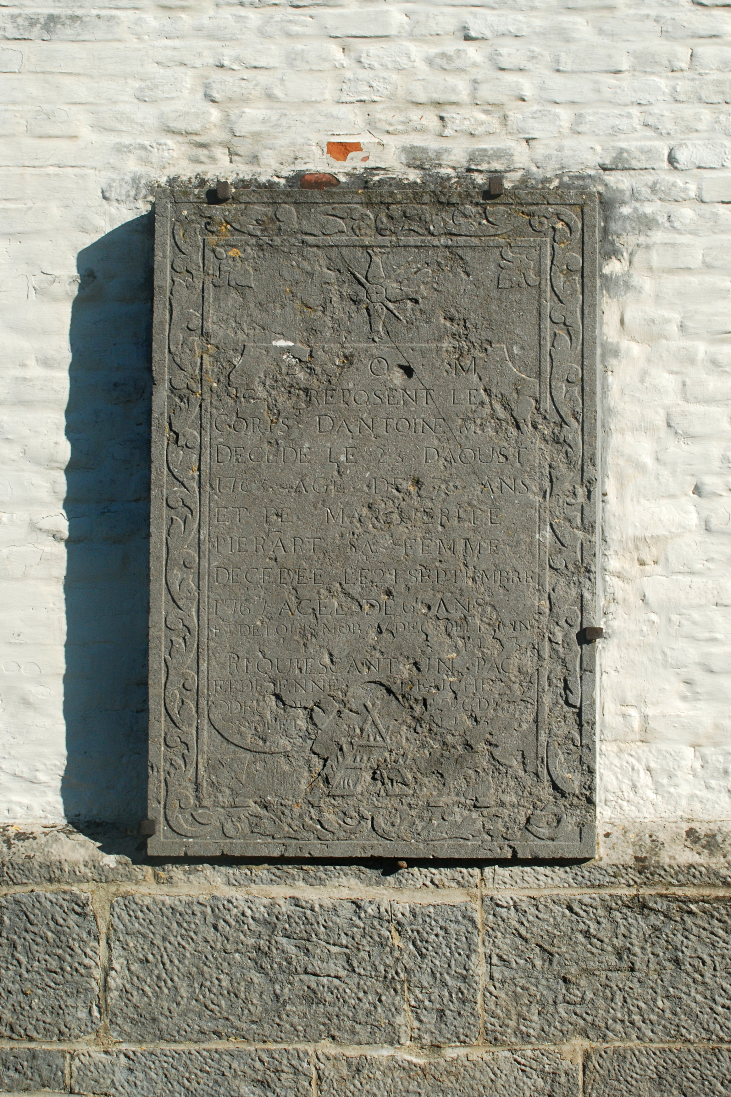 Belgique - Brabant wallon - Nivelles - Bornival - Eglise Saint-François